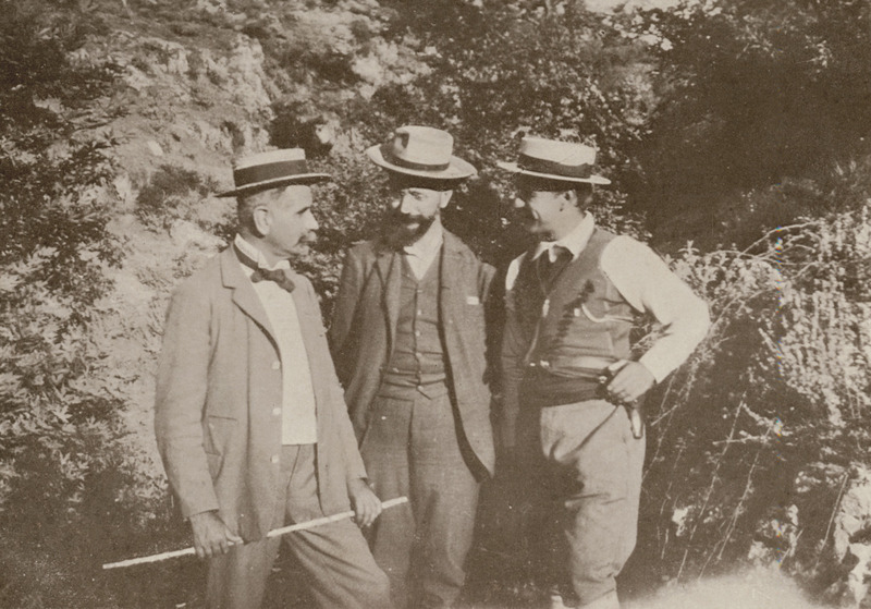 Les trois chefs insurgés- C Phoumis, E Venizelos, C Manos - Van Den Brule Alfred - 1907